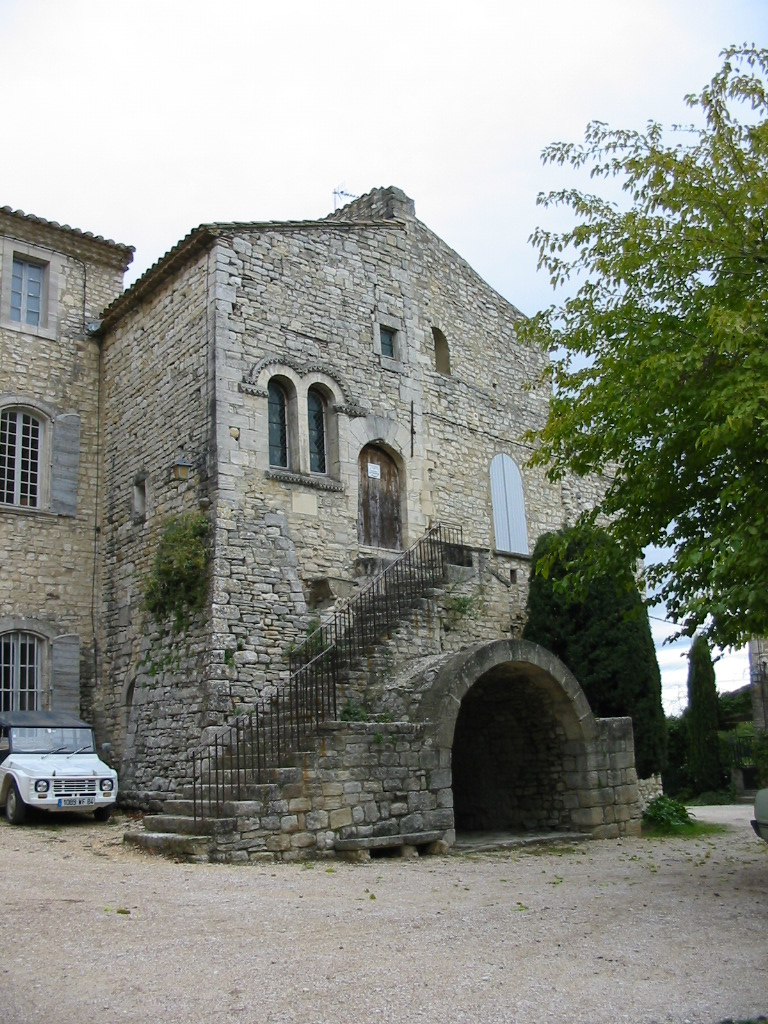 La maison natale de Crillon le brave